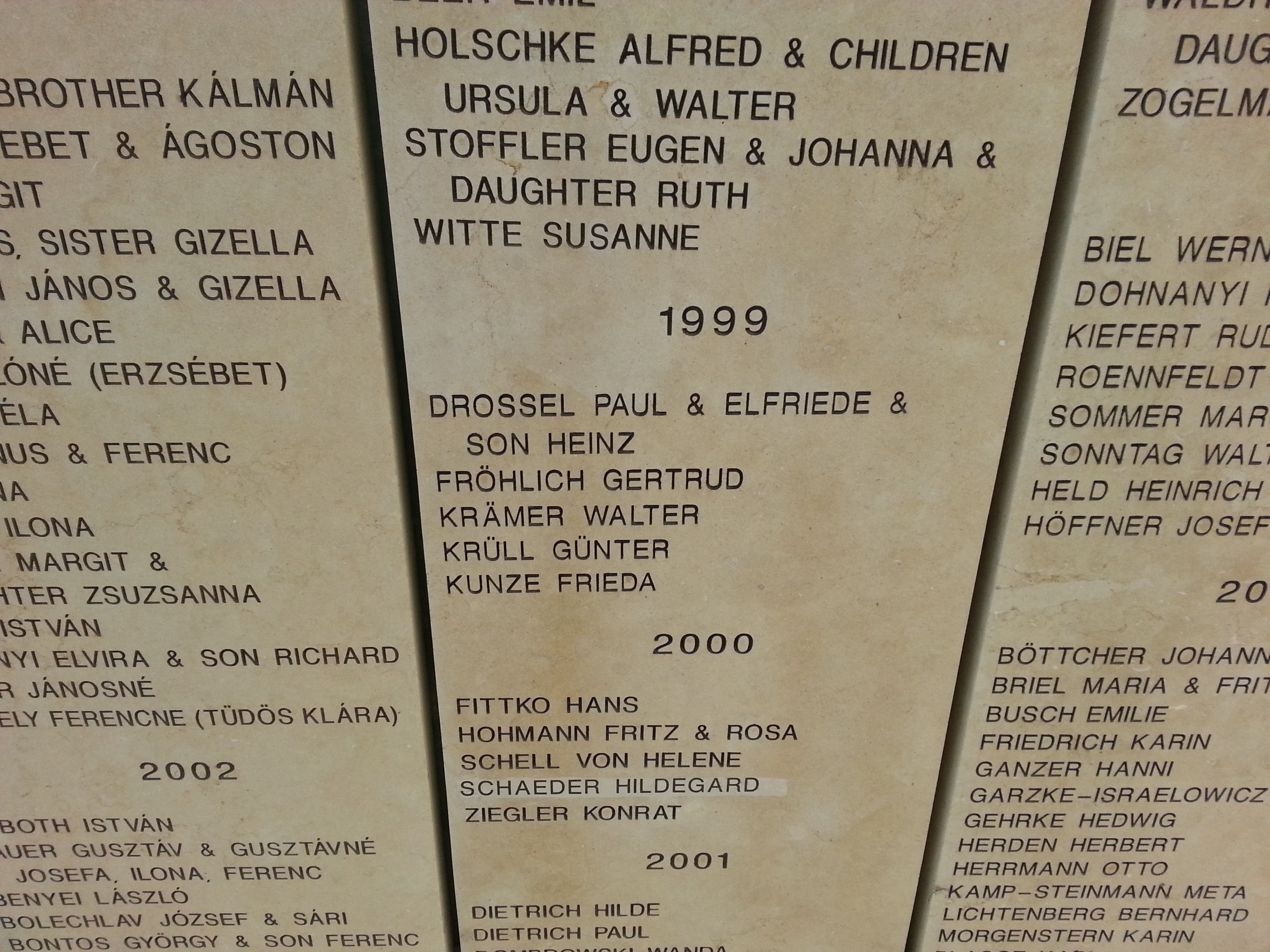 Die Namen der Geehrten sind in der Gedenkstätte auf Steintafeln eingraviert.